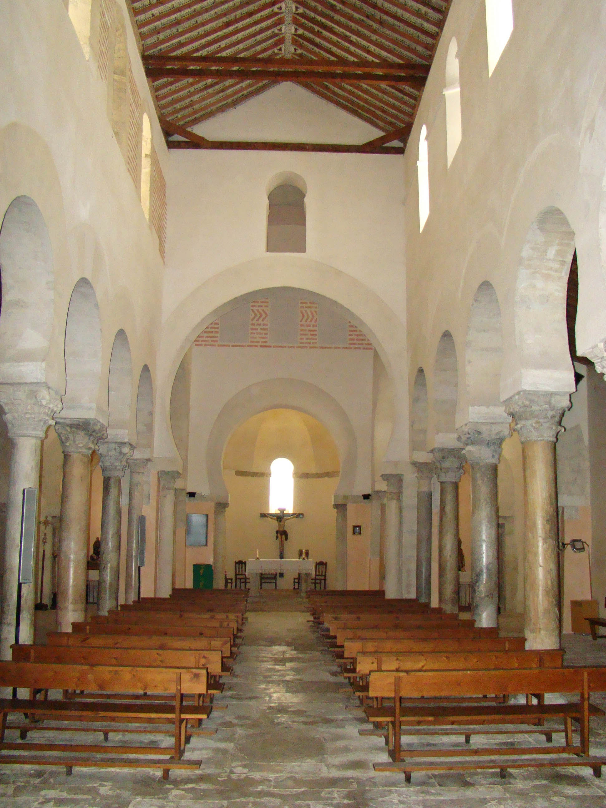 Iglesia mozárabe de San Cebrián en la localidad de San Cebrián de Mazote, Valladolid, España. Nave central y presbiterio.